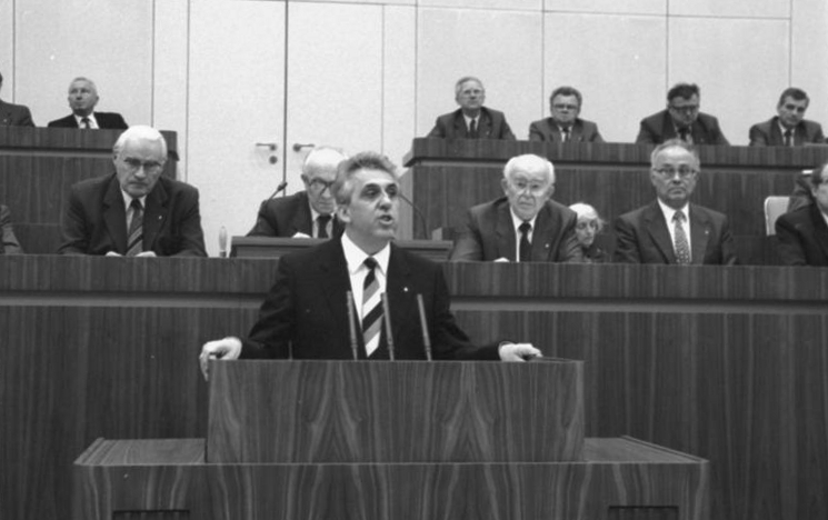 10. Volkskammertagung, Rede Egon Krenz ADN-ZB Mittelstädt 24.10.89 Berlin: VK-Tagung Die Volkskammer der DDR trat zu ihrer 10. Tagung zusammen. Auf Anfrage der SED-Fraktion erfolgte die Wahl in die höchsten Staatsämter. Nach seiner Wahl zum Vorsitzendes des Staatsrates und des Nationalen Verteidigungsrates der DDR ergriff der Generalsekretär des ZK der SED, Egon Krenz, das Wort zu einer Erklärung. Abgebildete Personen: Krenz, Egon: Generalsekretär des ZK der SED, Staatsratsvorsitzender, DDR